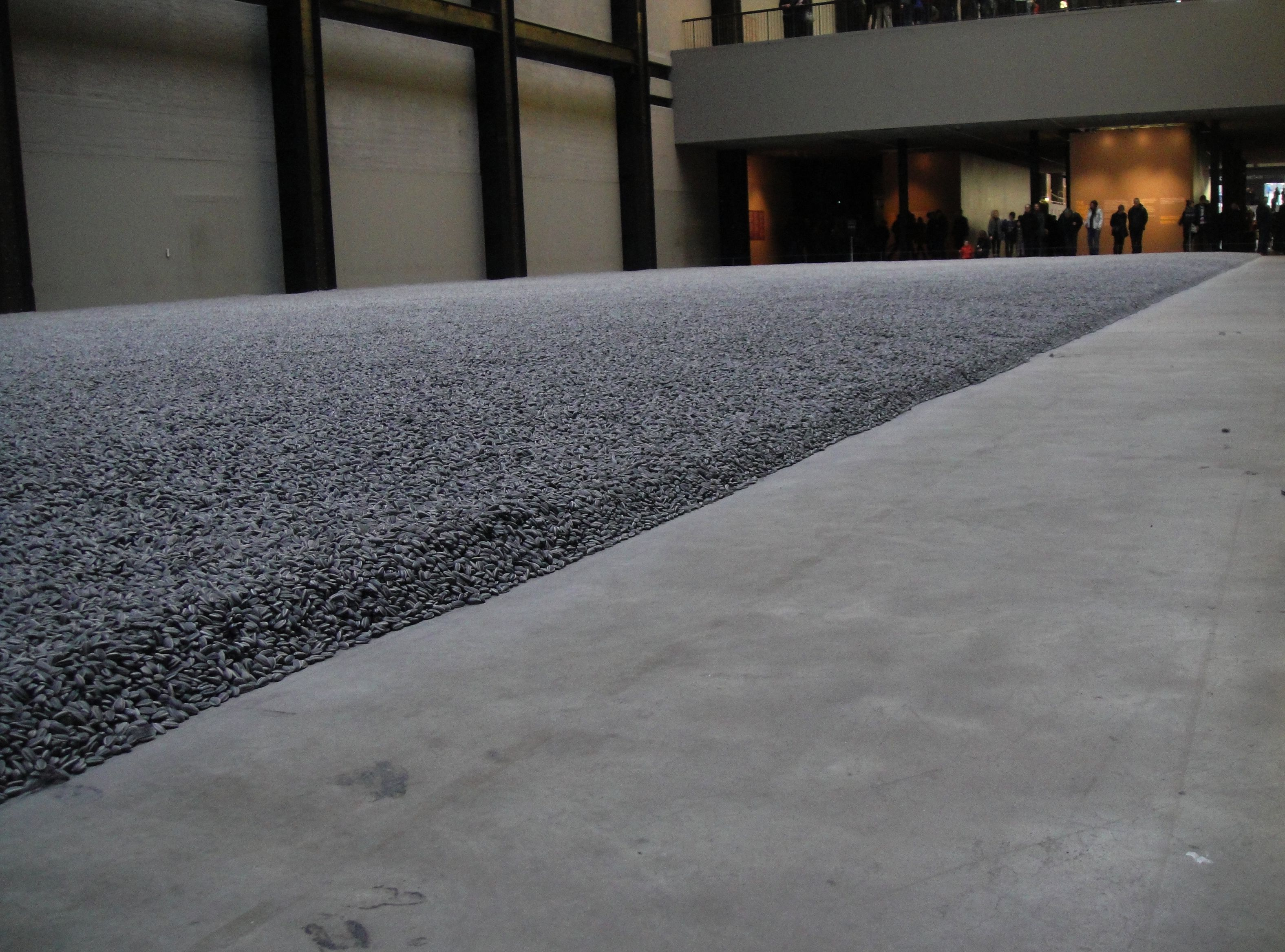 'Sunflower Seeds' by Ai Weiwei, Tate Modern Turbine Hall.